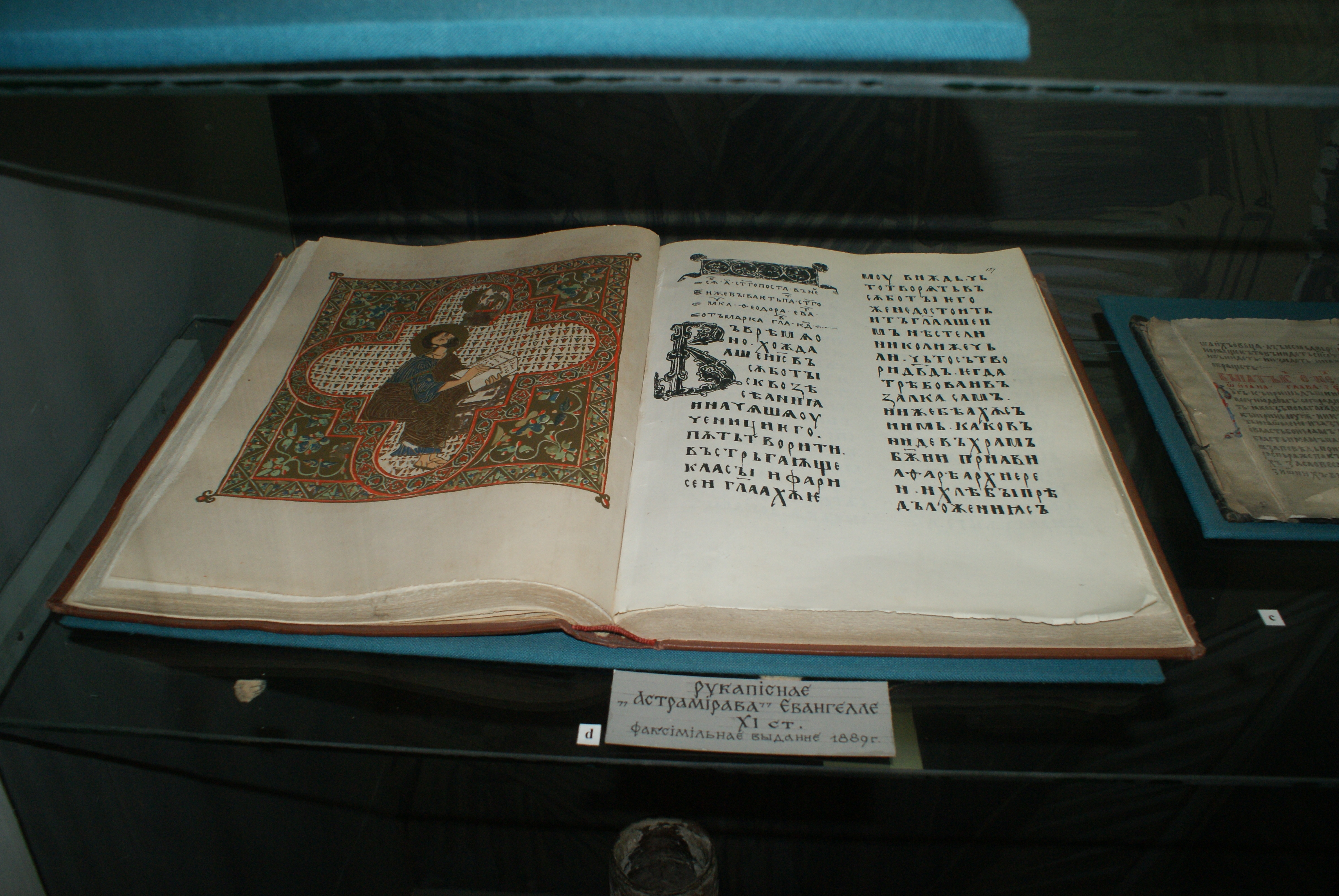 Рукапіснае Астрамірава Евангелле XI ст. факсімільнае выданне 1889 года